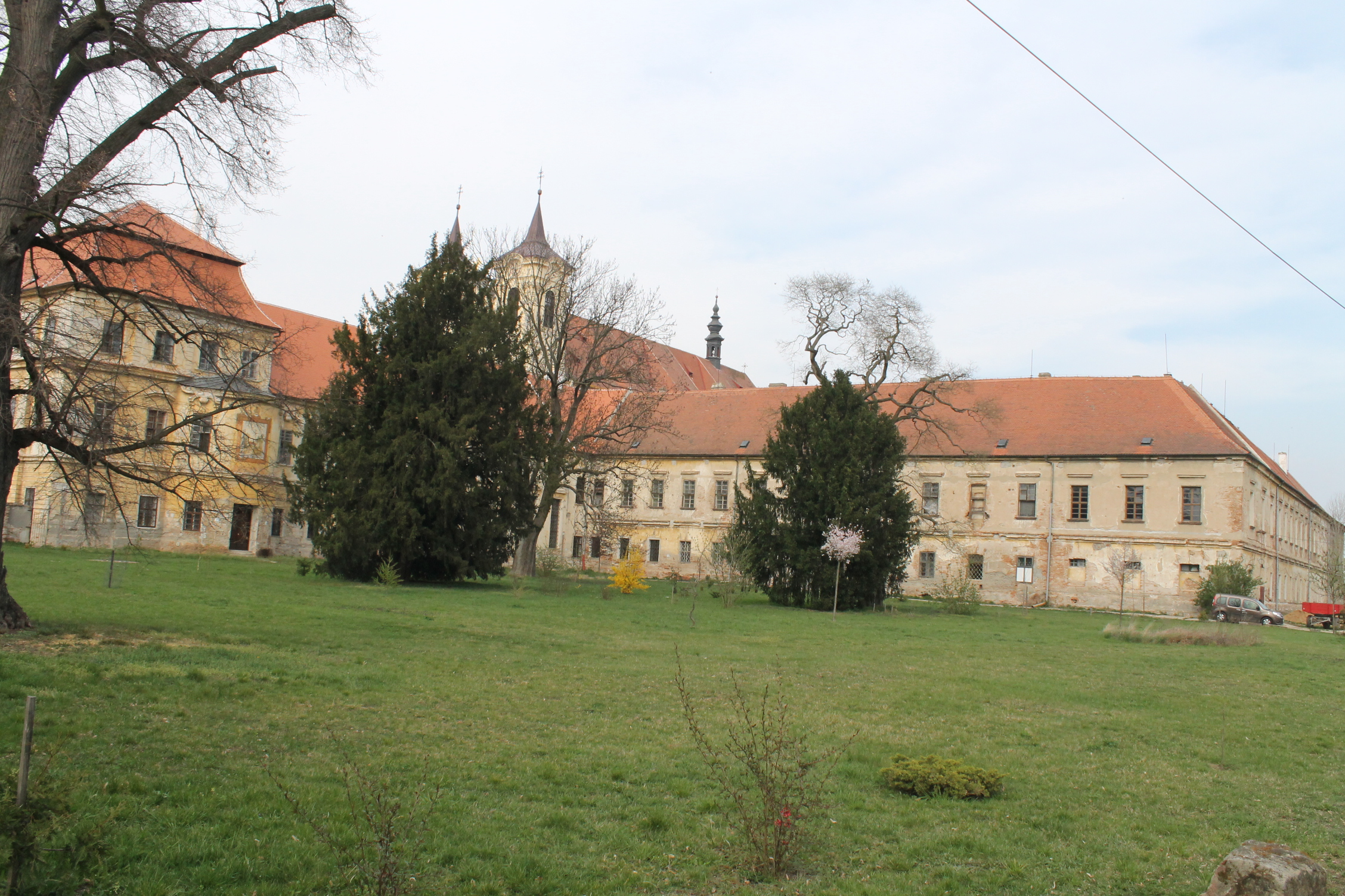 Benediktinský klášter, Rajhrad